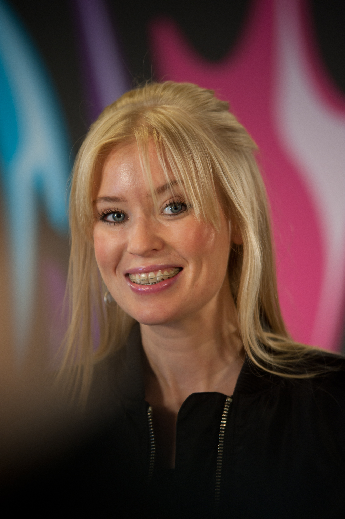 Linda Sundblad 2010 at a press conference for Melodifestivalen 2011